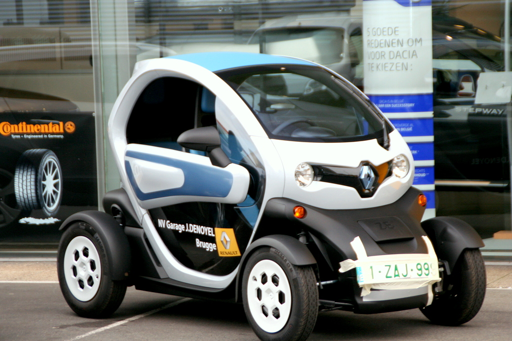 Renault Twizy